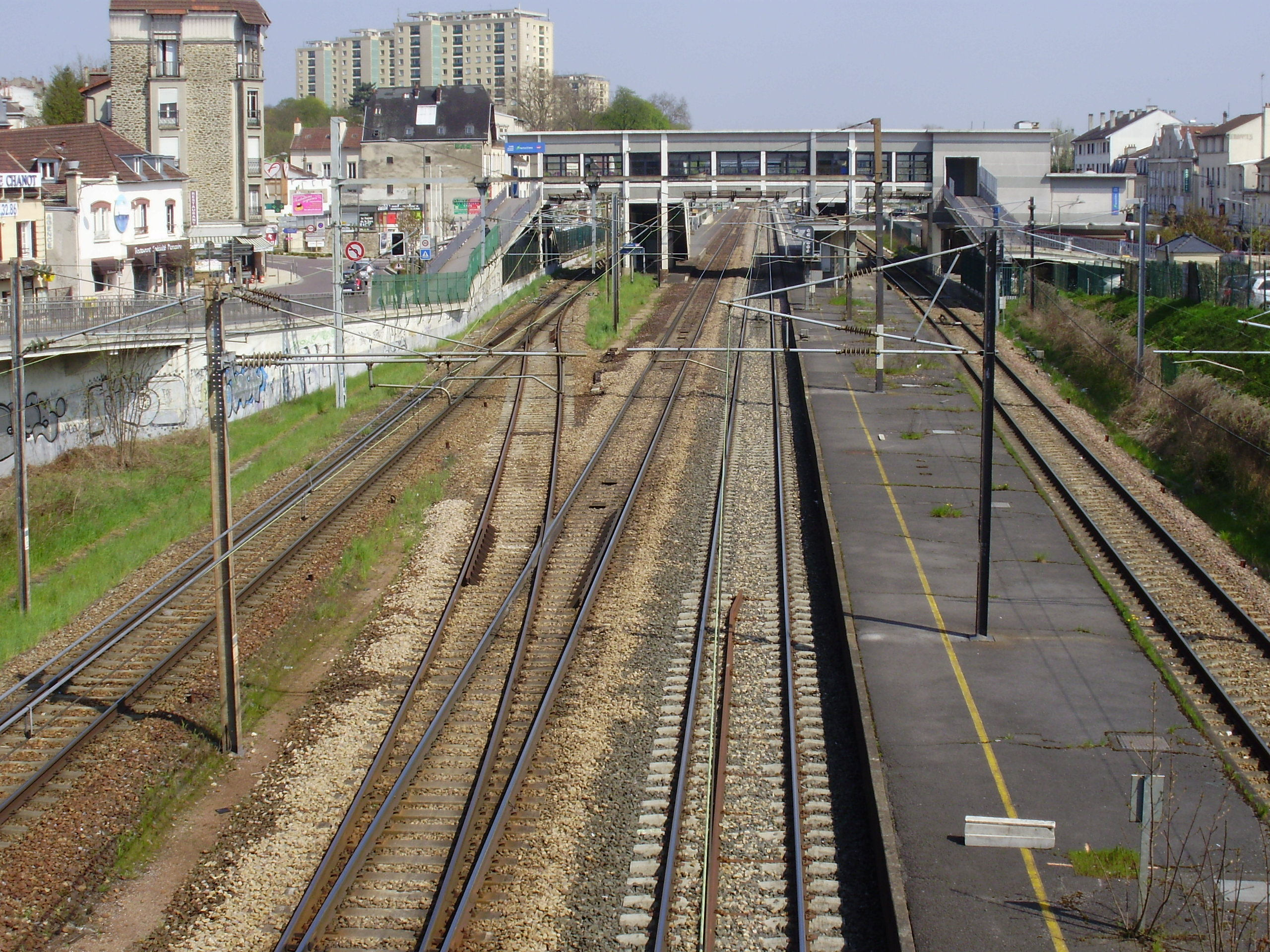 Gare de Lagny - Thorigny : vue générale en regardant vers Meaux depuis le pont routier (à Pomponne, Seine-et-Marne, France) situé à l'ouest de la gare.